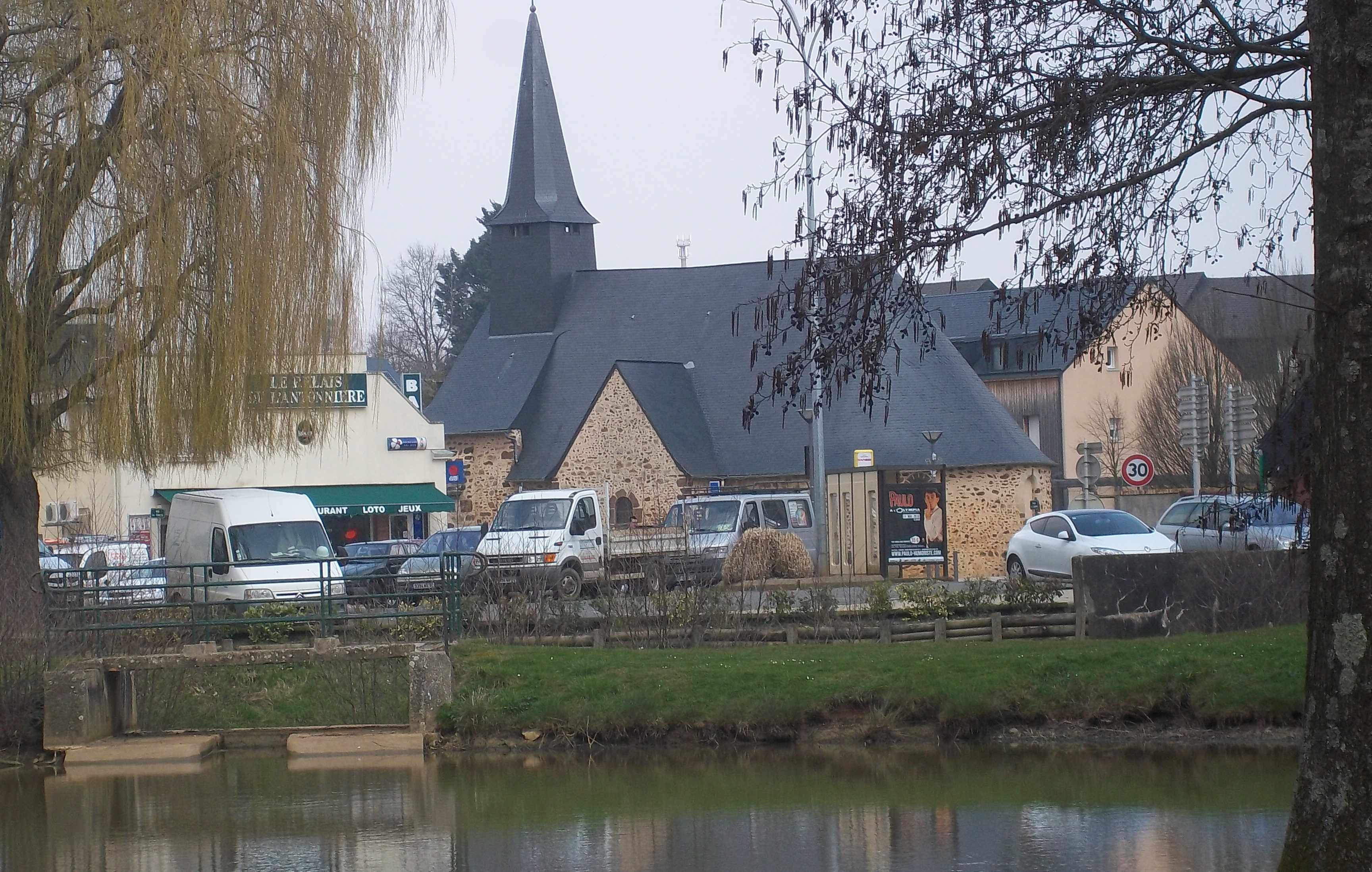 La Milesse - plan d'eau